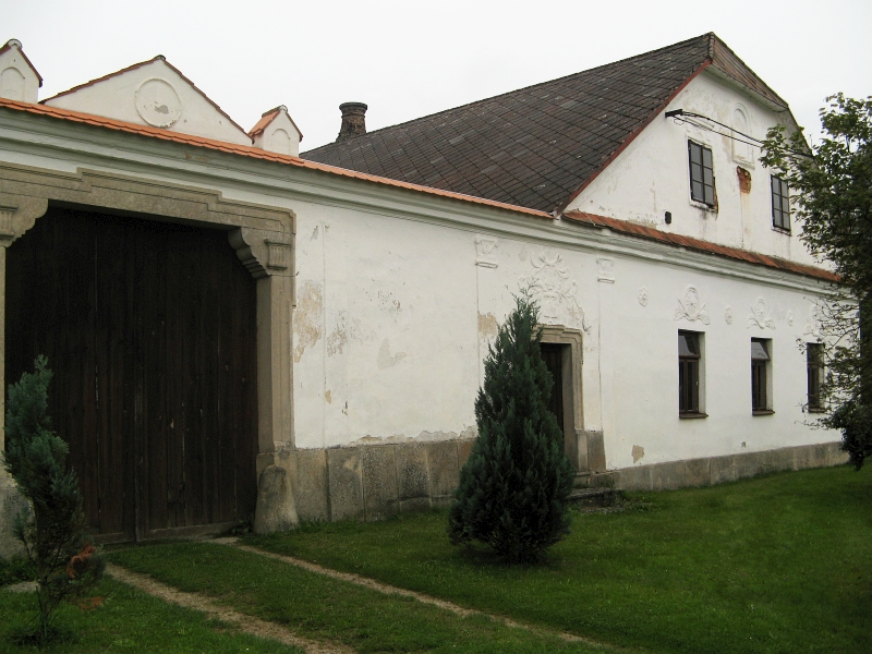 Usedlost čp. 1, Bořetín 1, Bořetín (okres Jindřichův Hradec).